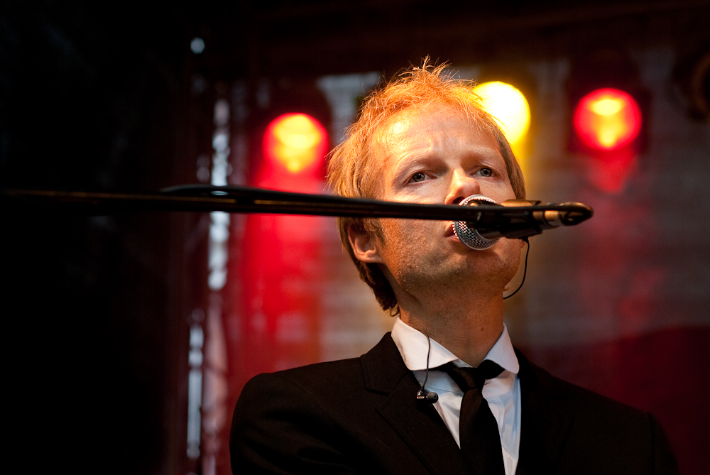 Michel van Dyke mit seinen Band-Kollegen von Ruben Cossani sorgten auf der NDR 90,3-Bühne am Spritzenplatz für den musikalischen Abschluss der Altonale 2009.